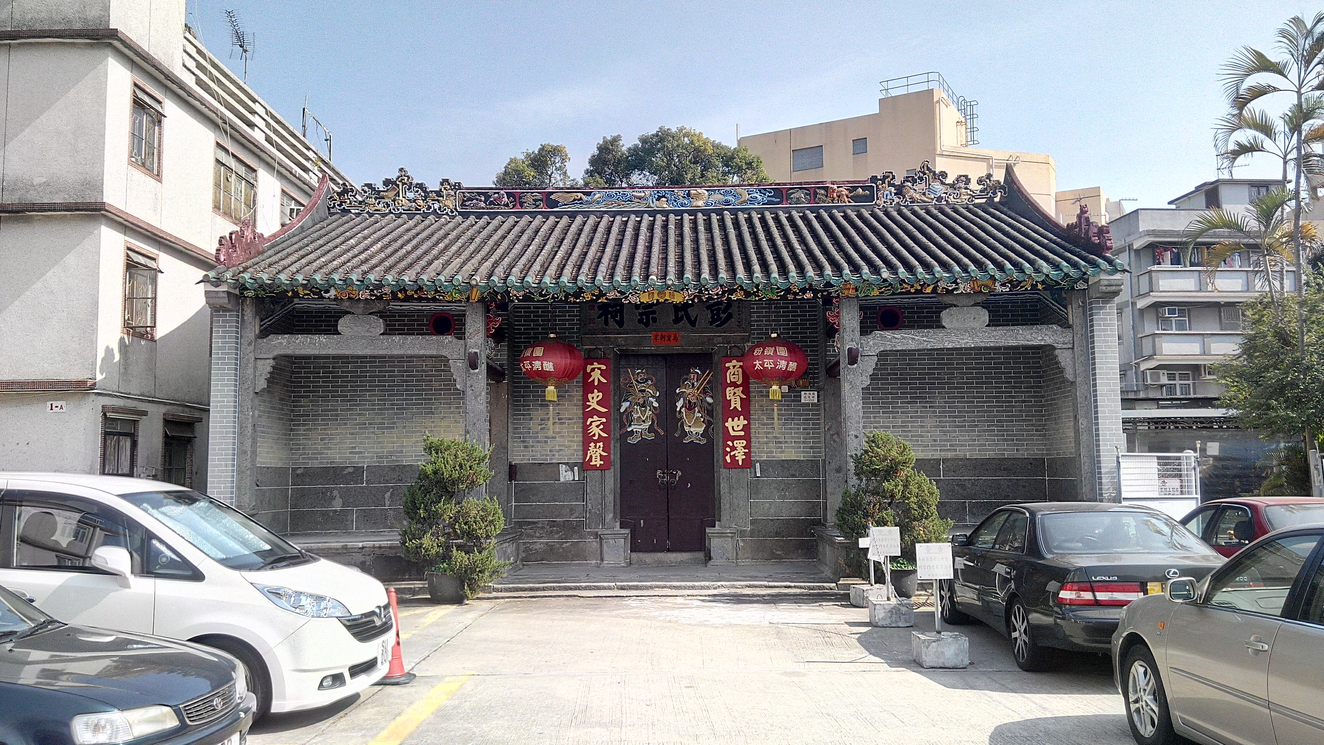 粉嶺圍彭氏宗祠